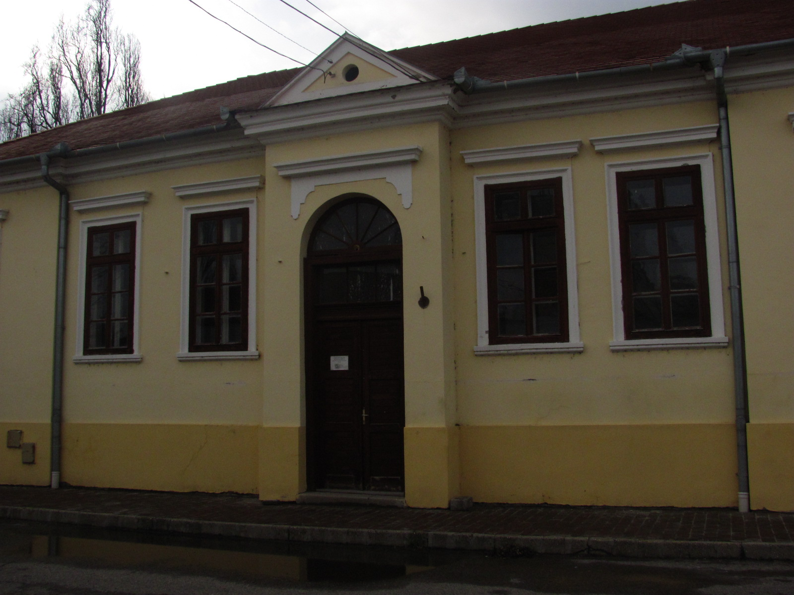 A képen a szarvasi Mittrovszky-kastély részlete látható, ahol a könyvtár is helyet kapott ezelőtt.